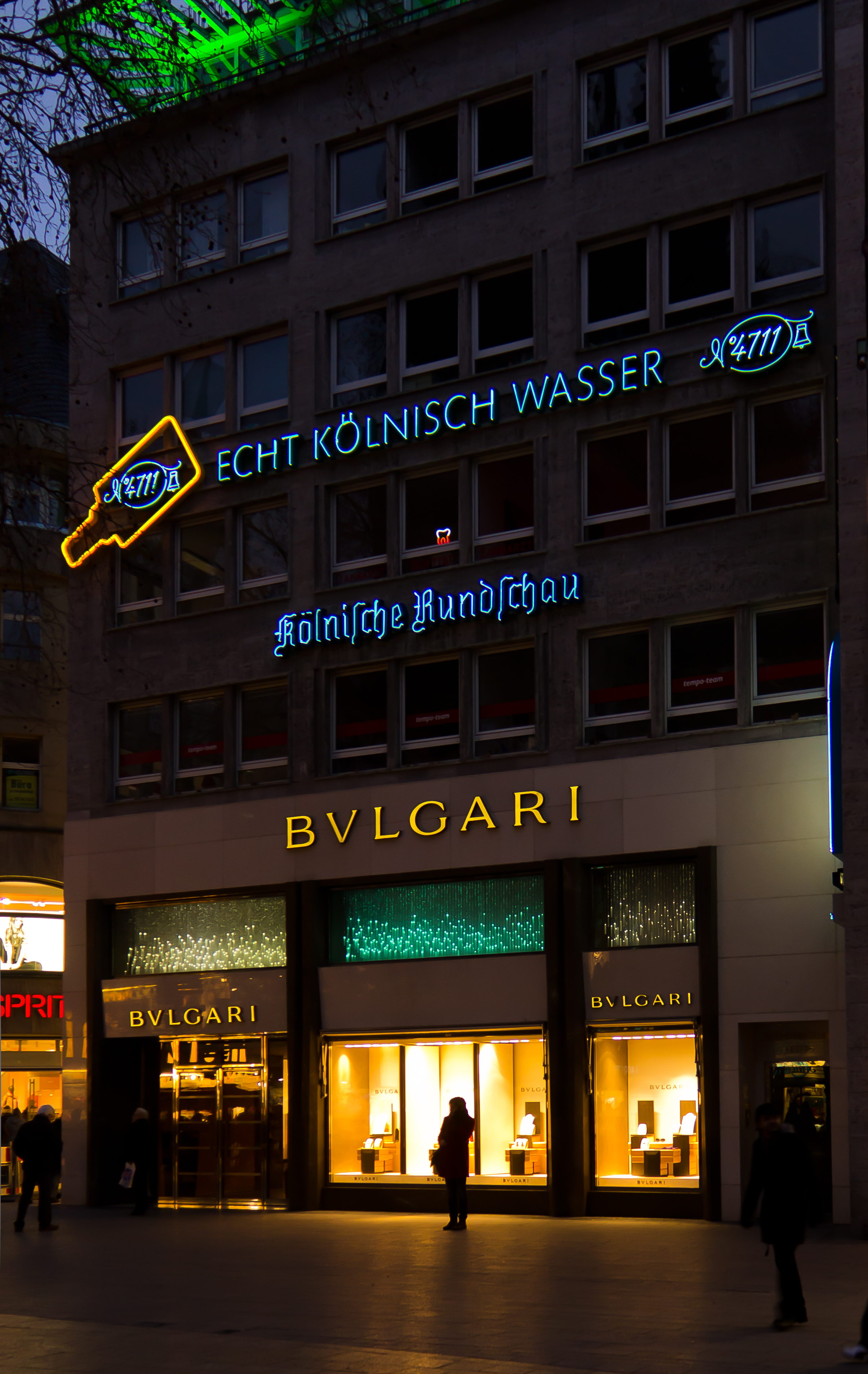 Wallrafplatz Köln - Südseite am späten Nachmittag. Links: Wallrafplatz 1, Ladengeschäft von Bulgari, Leuchtreklame für „4711 Echt Kölnisch Wasser“ sowie „Kölnische Rundschau“